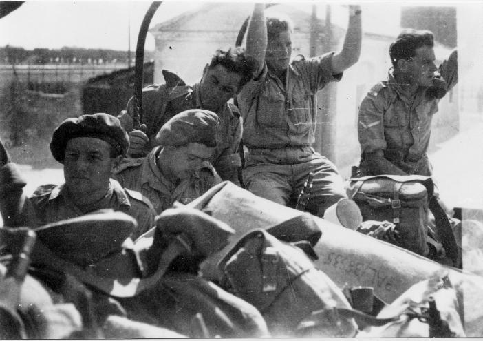 פניתי אל ארכיון בית הפלמ"ח בזו הלשון: שלום רב, ...הריני מבקש לעשות שימוש [בוויקיפדיה] בתמונות המוצגות באתר שלכם. ... משמעות האישור היא מתן היתר לכל מאן דבעי לשכפל את התמונה, *תוך ציון מקורה*. במקרה כזה, ייתכן שתרצו לאשר שימוש בתמונה מוקטנת, שאינה מתאימה להדפסה בספר. תודה, ד"ר עוזי וישנה ותשובתם: ... כל התמונות הנמצאות באתר הפלמ"ח ניתנות להורדה. הן מראש אינן באיכות הדפסה לספר ו/או פרסום אחר. ניתן להשתמש בתמונה המבוקשת תוך ציון העובדה שהיא נמסרה באדיבות "אוצר תמונות הפלמ"ח". בברכה, ד"ר אלדד חרובי, מנהל ארכיון הפלמ"ח. (כתובת הארכיון: )